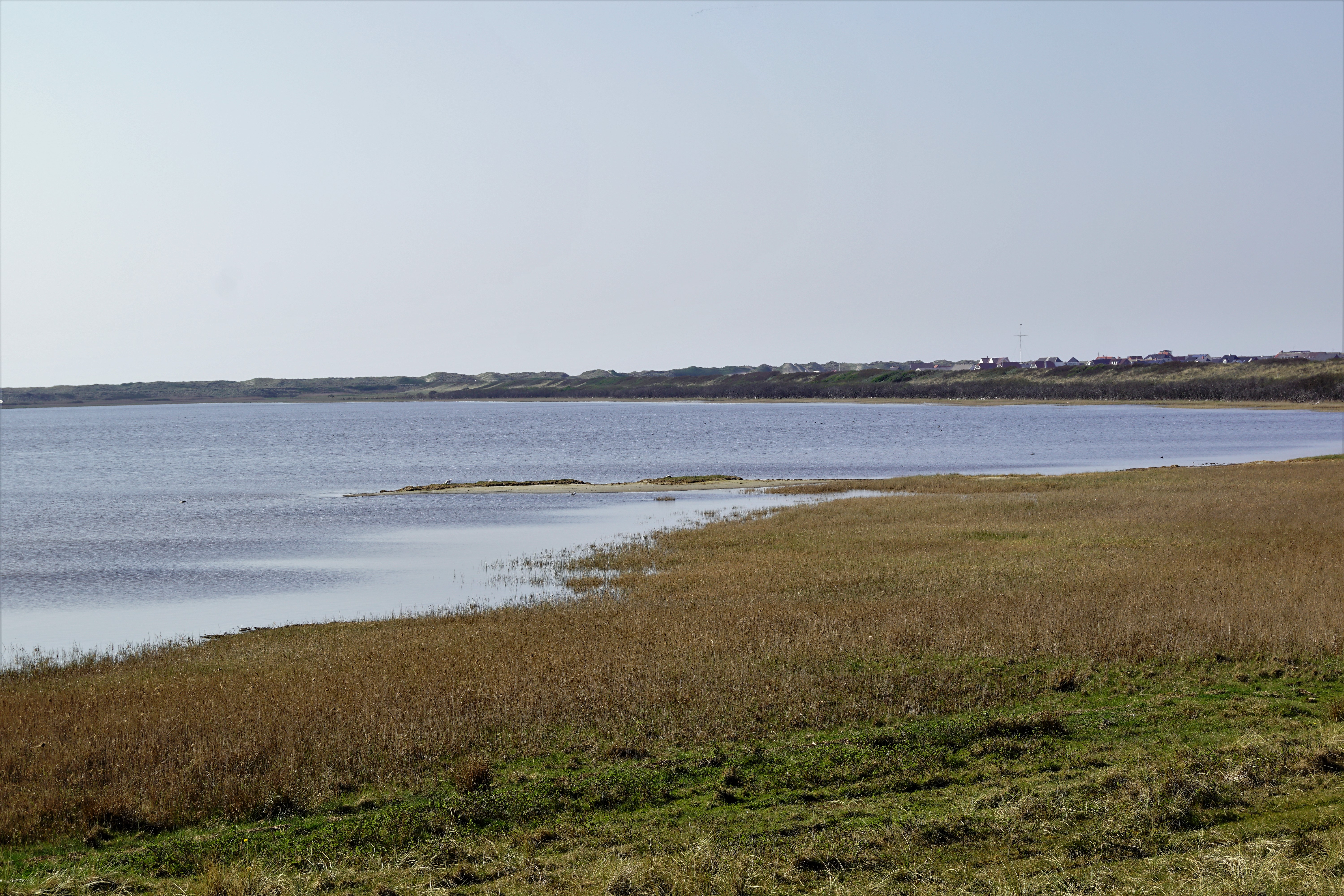 Nordenden af Aggertangen set fra vejdæmningen